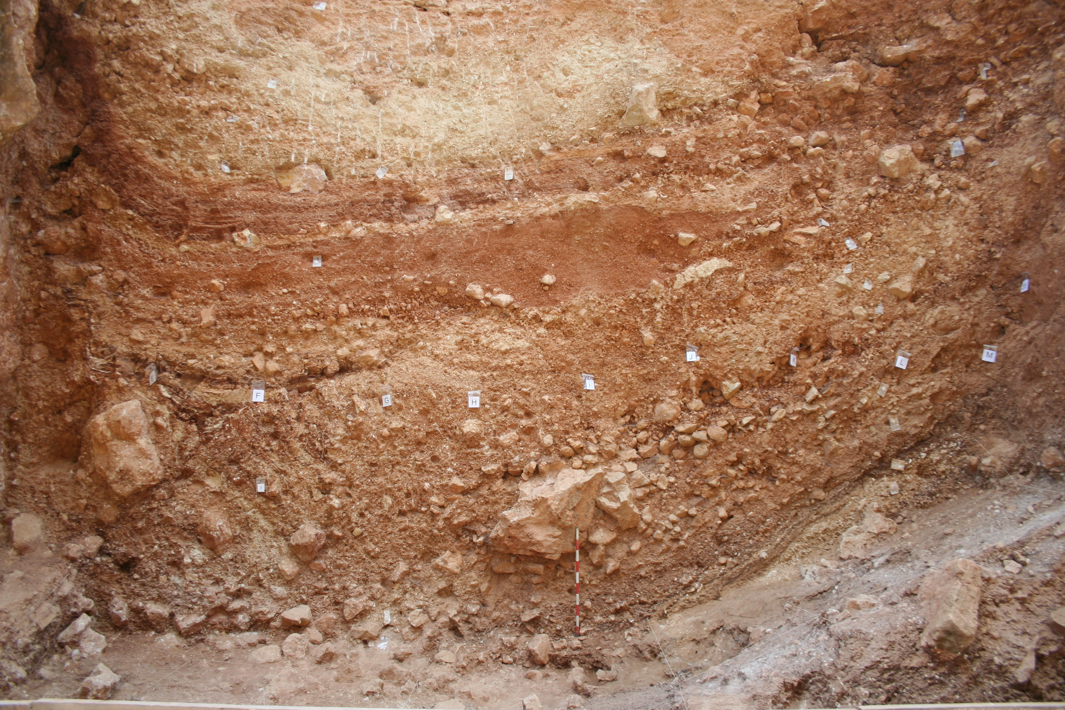 Perfil del yacimiento de la Sima del Elefante en 2006.